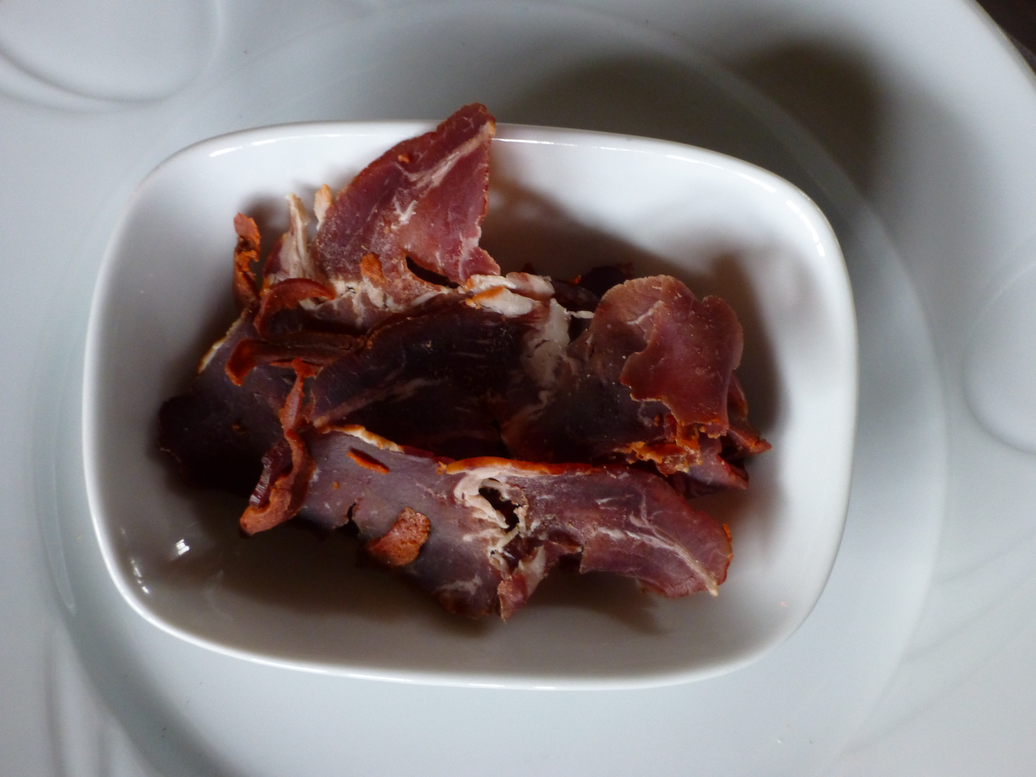 Pastırma